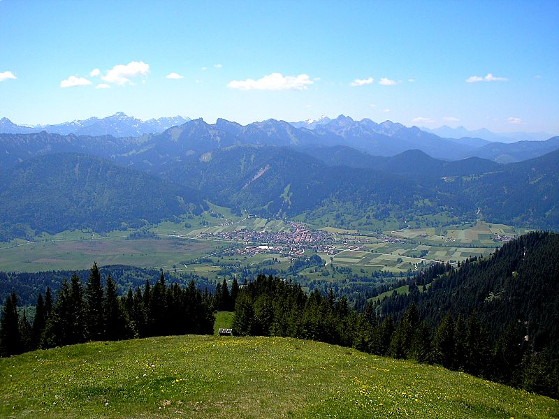 Unterammergau (Landkreis Garmisch-Partenkirchen, Ammergauer Alpen, Oberbayern). Gesamtansicht vom Hörnle. Eigene Aufnahme, Mai 2007 / Unterammergau (Ammergau Alps, Bavaria, Germany. Total view from Mount Hoernle. Own photo, May 2007